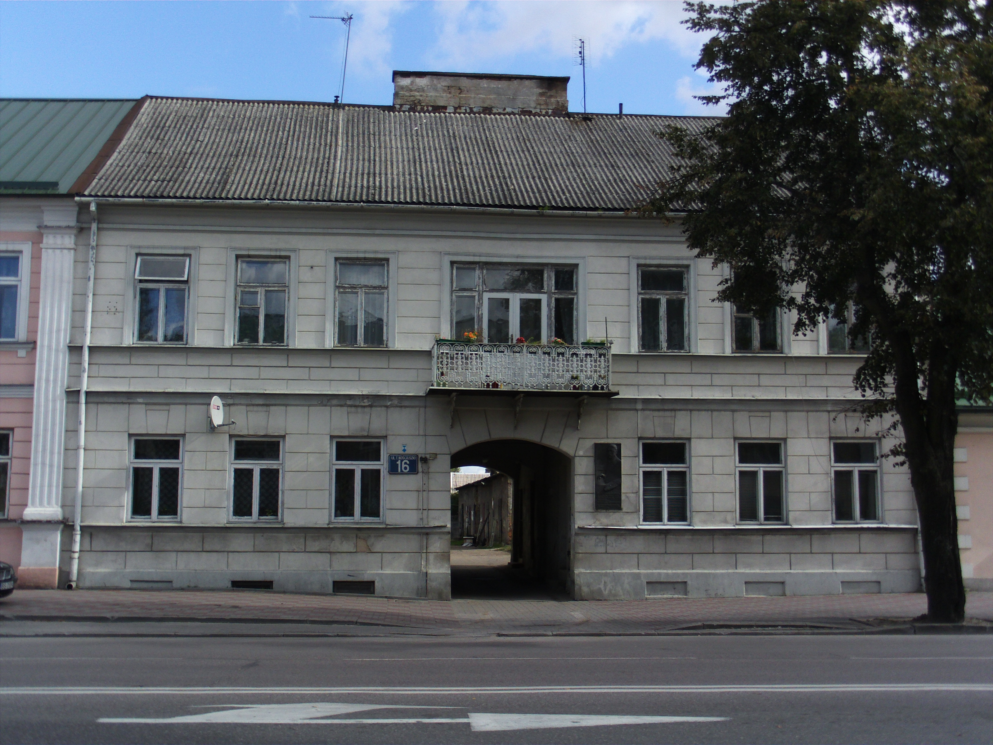 Suwałki ul. Kościuszki 16